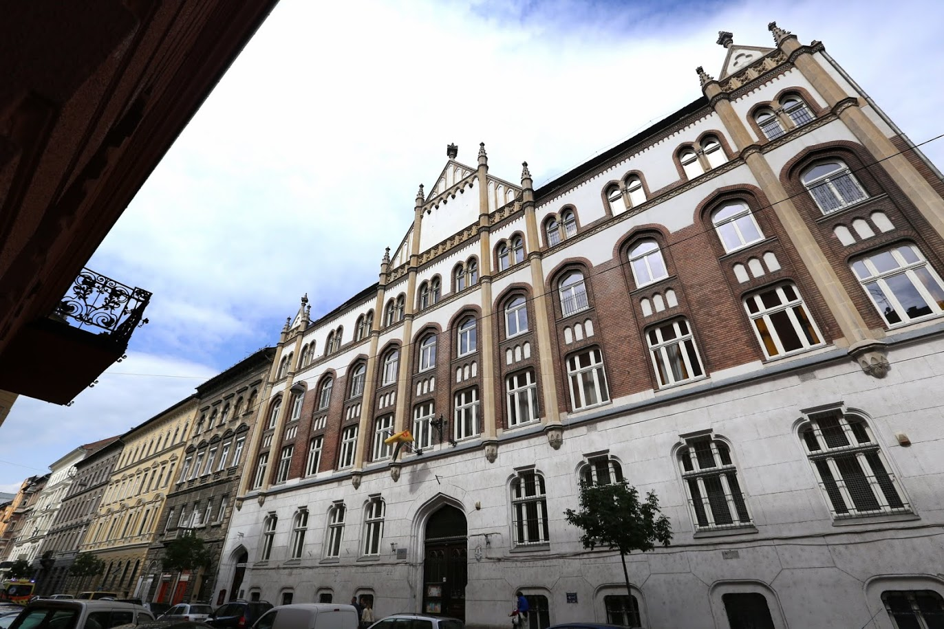 Vörösmarty Mihály Általános Iskola épülete (1064 Budapest, Vörösmarty utca 51.), korábban: a budapesti skót misszió iskolája és temploma.